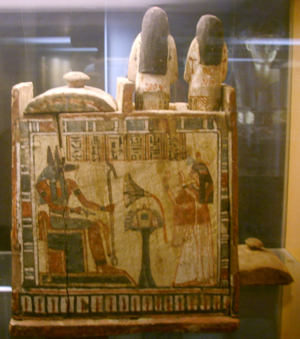 urnetta Museo_archeologico_di_Firenze museo egizio museum in Florence